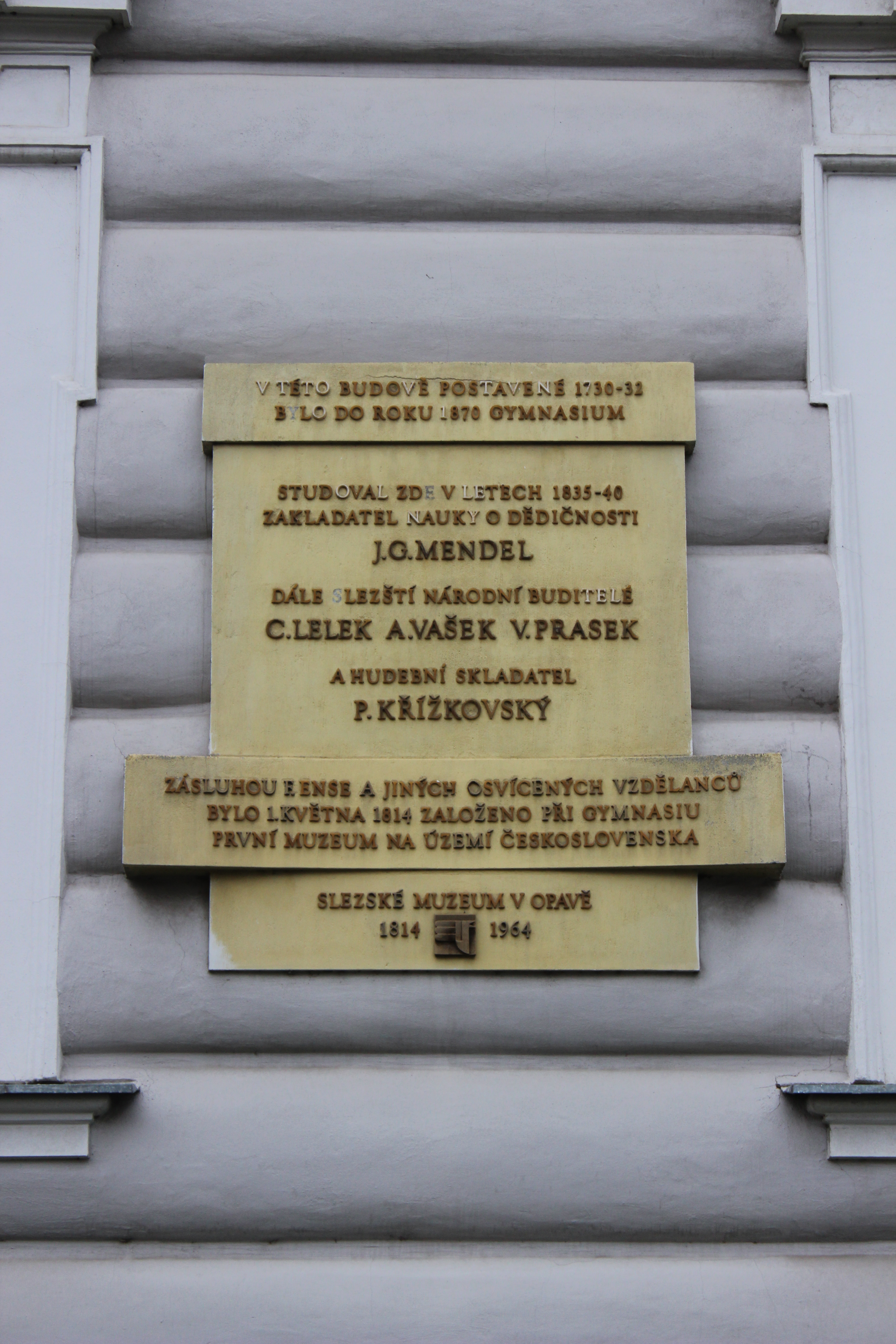 Pamětní deska na budově zemského archivu v Opavě.